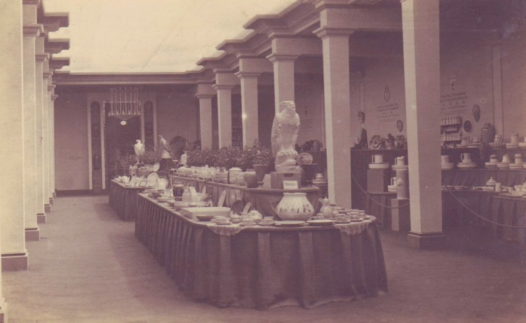 Postkarte der Jahresschau Deutscher Arbeit von 1922 in Dresden. Rechts zwischen den ersten Säulen ist der Stand von Elsterwerda zu sehen.